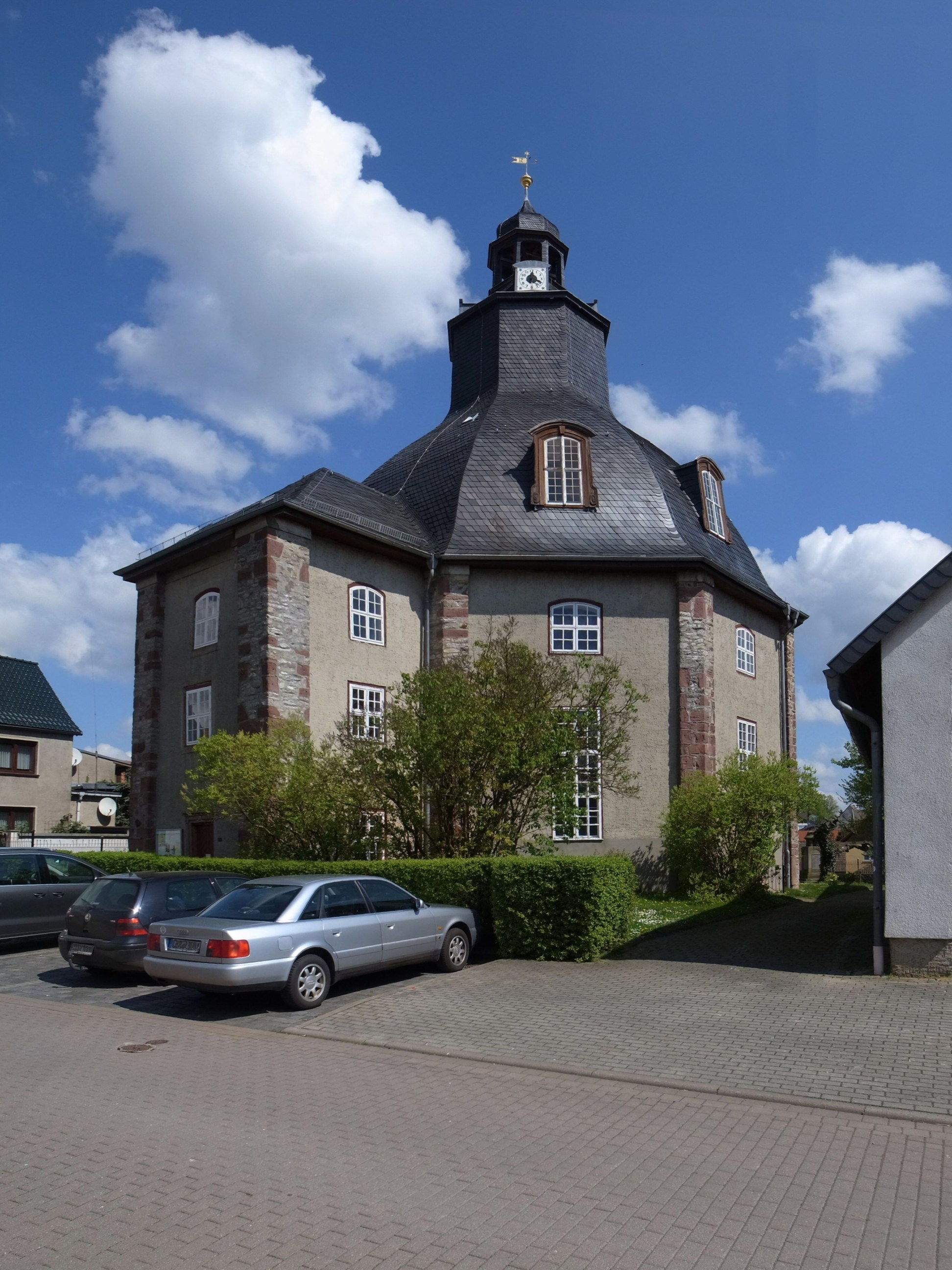 Schwenda, Evangelische Kirche St. Cyriaci und Nicolai